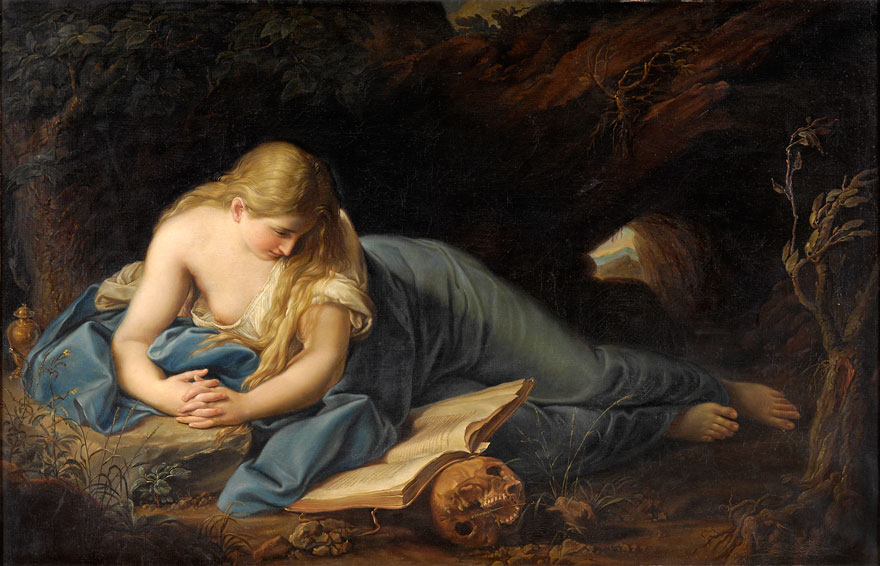 Büßende Magdalena, Öl auf Leinwand, 72 x 112 cm